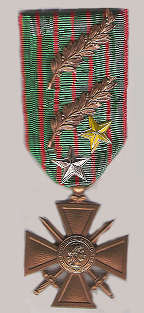 Croix de guerre 1814-1918 avec 2 palmes, 1 étoile vermeil et 1 étoile d' argent